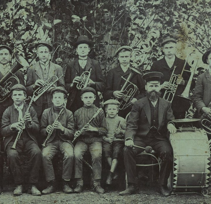 Sulevi pasunakoor. (1910)